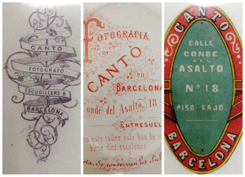 Revés fotografíes família Cantó